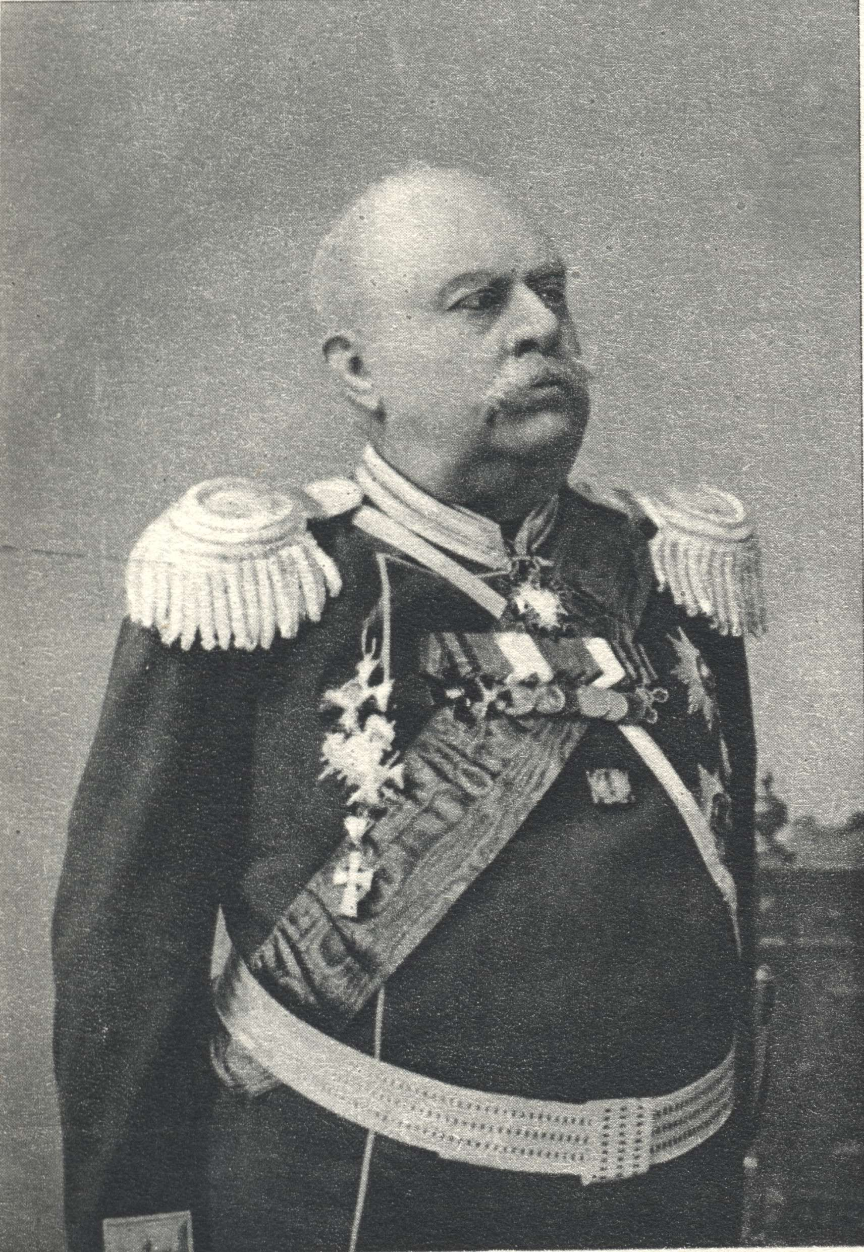 Suomen sotaväen paallikkö kenraali Georg Edvard Ramsay vuonna 1901